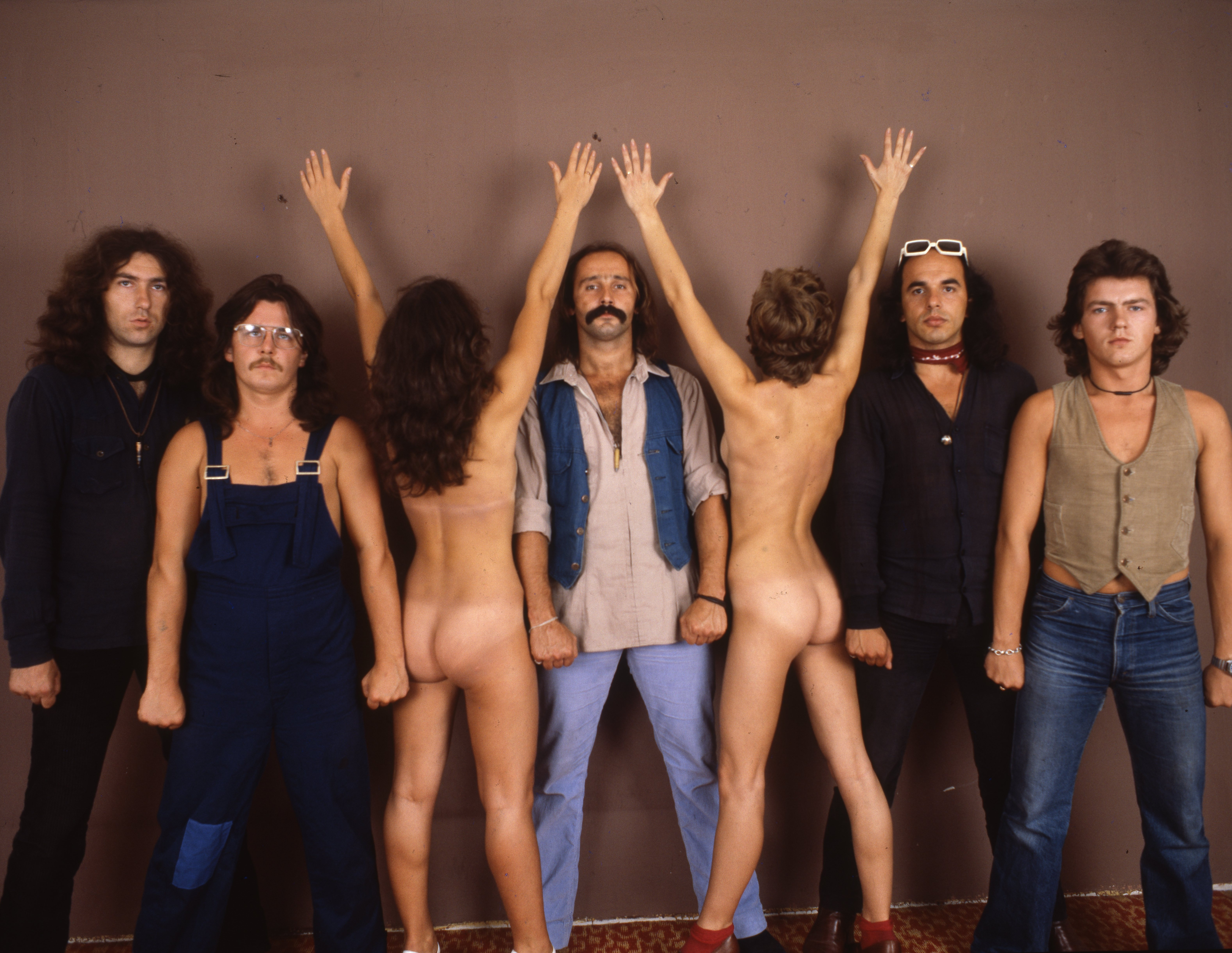 1979. Az Edda Művek tagjai, balról: Zselencz László, Csapó György, Pataky Attila, Slamovits István, Barta Alfonz. EDDA MŰVEK -- KÖLYKÖD VOLTAM Dokumentumfilm (1983)